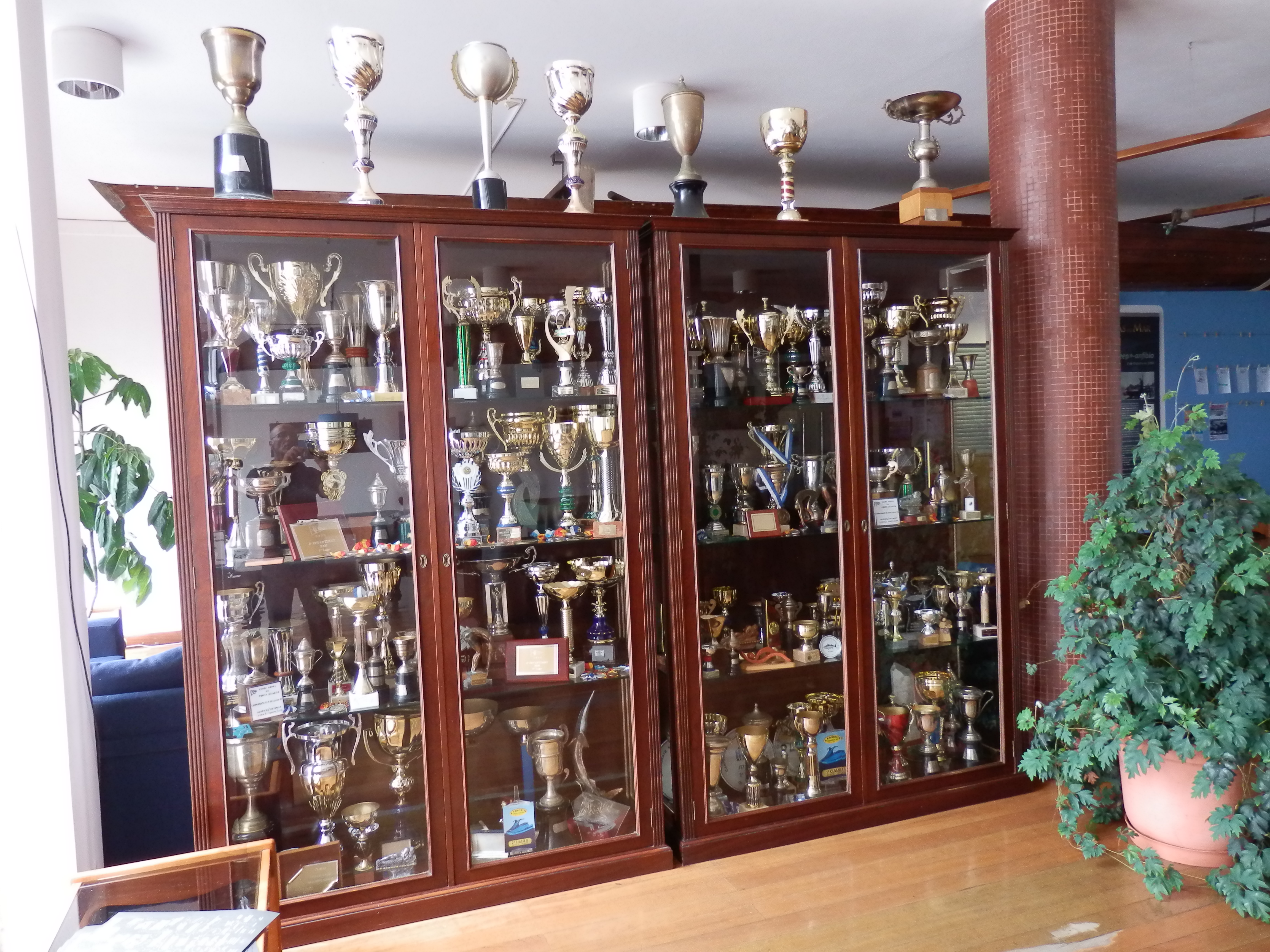 Estante de troféus do Clube Naval de Ponta Delgada